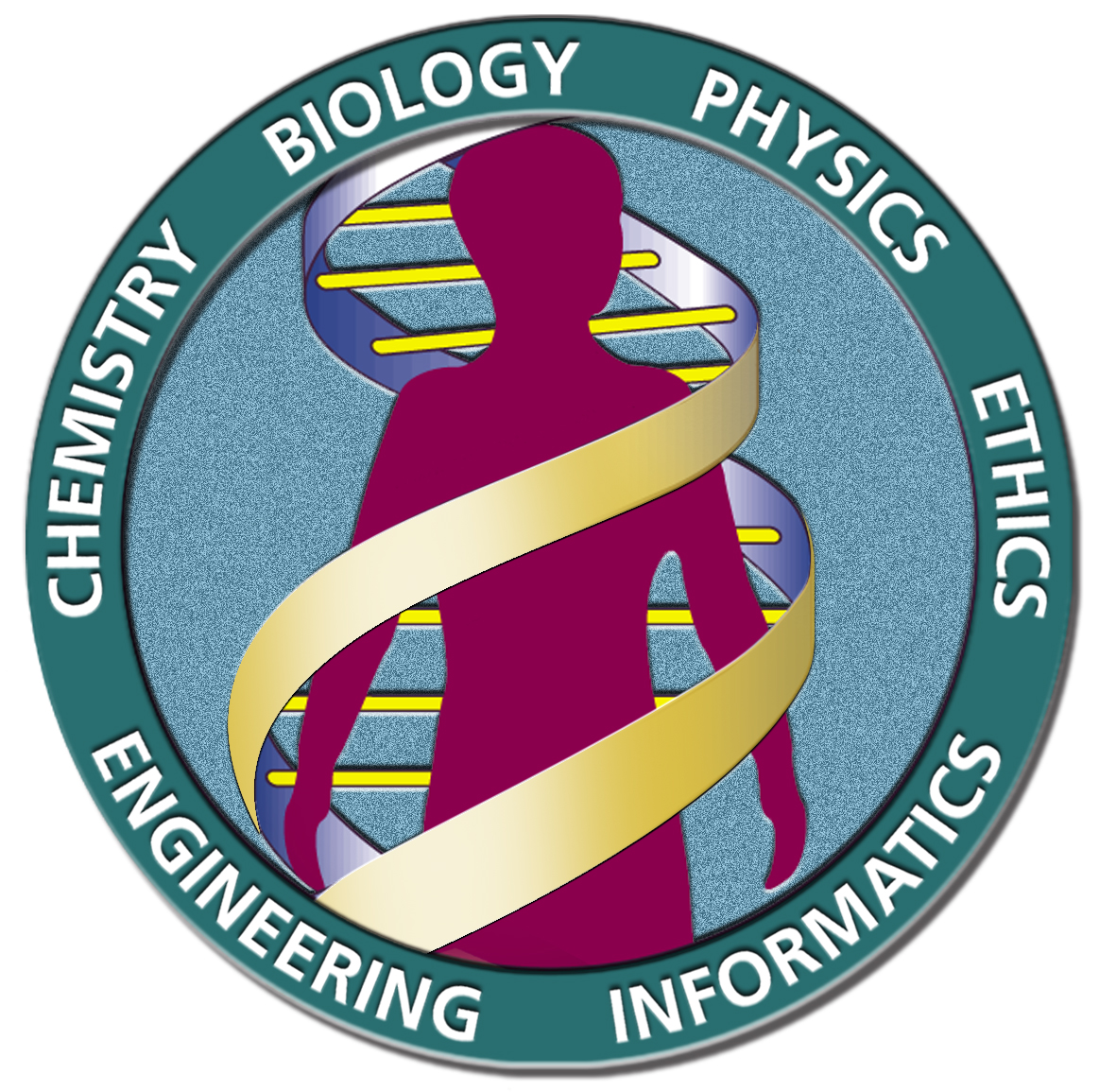 Human Genome Project logo (color).